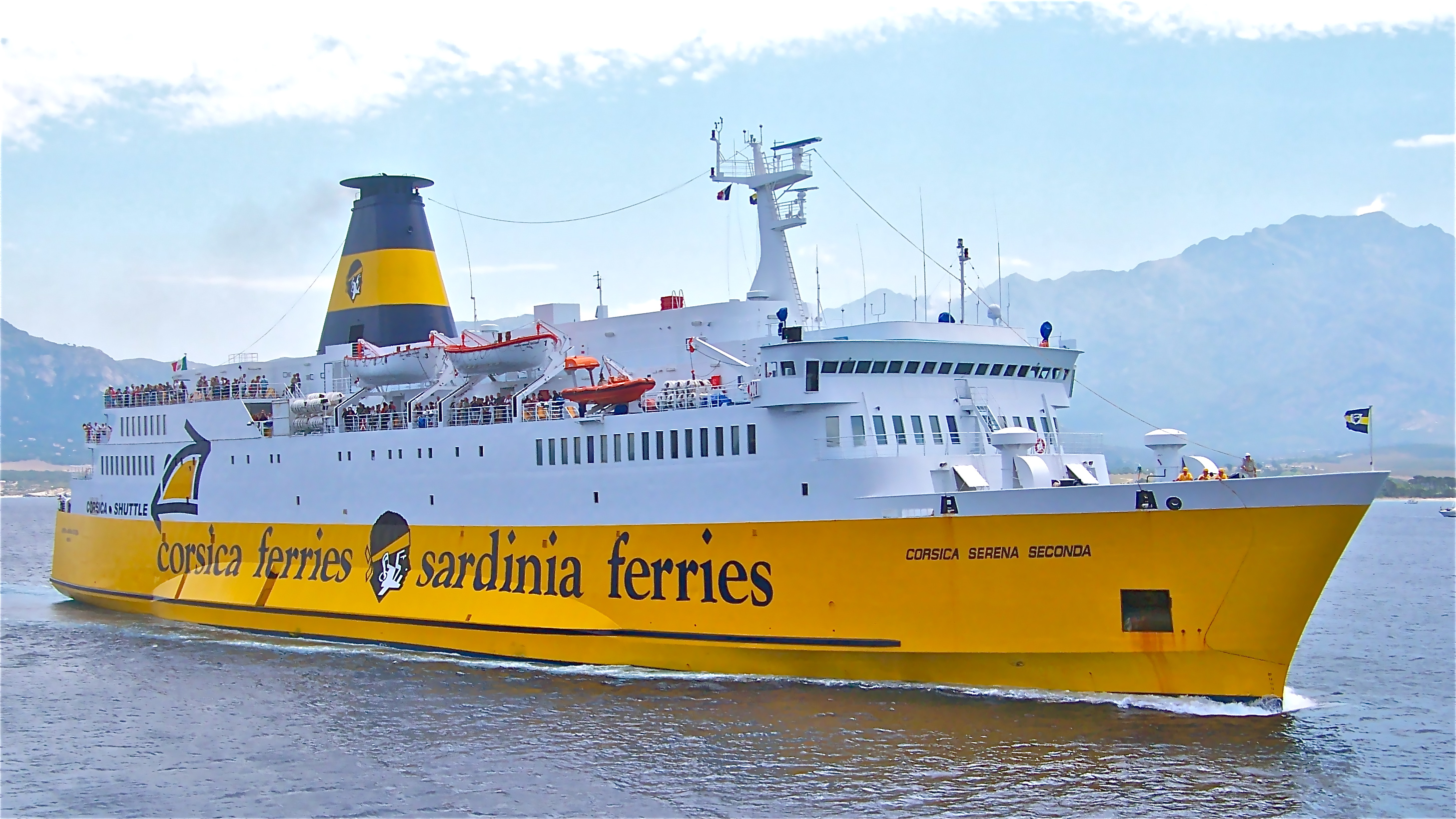 Le Corsica Serena Seconda, ancien navire de la Corsica Ferries et actuel "European Voyager" de la "Red Star Ferries", à Calvi (Corse), en provenance de Nice.